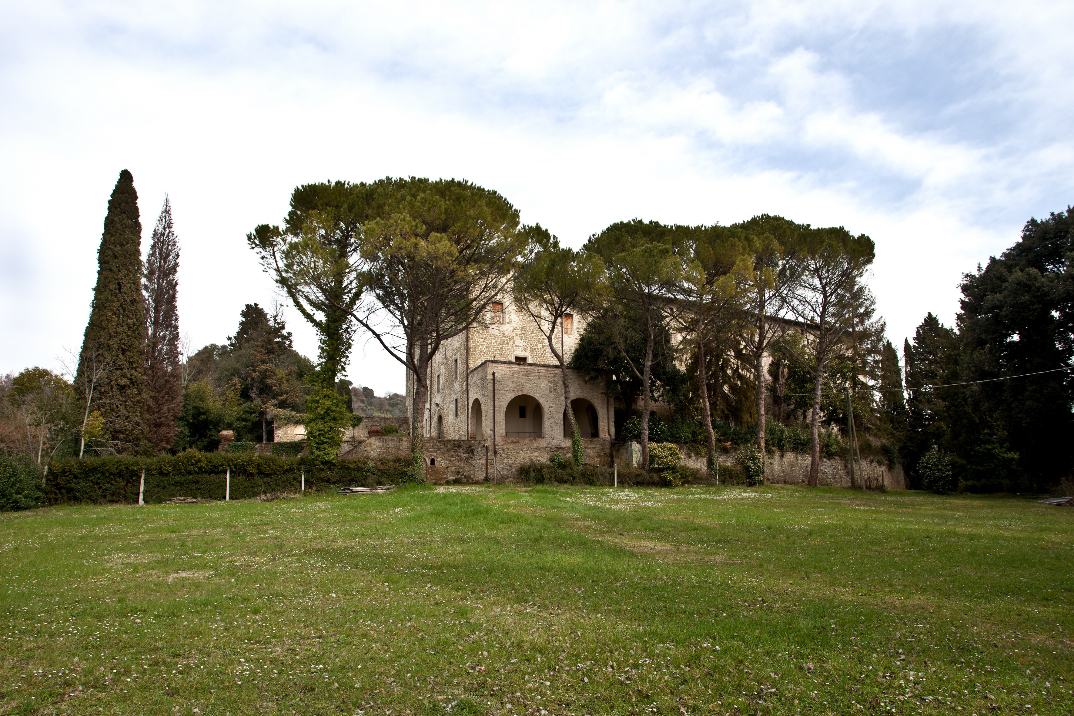 Abazia di Montelabbate (PU)